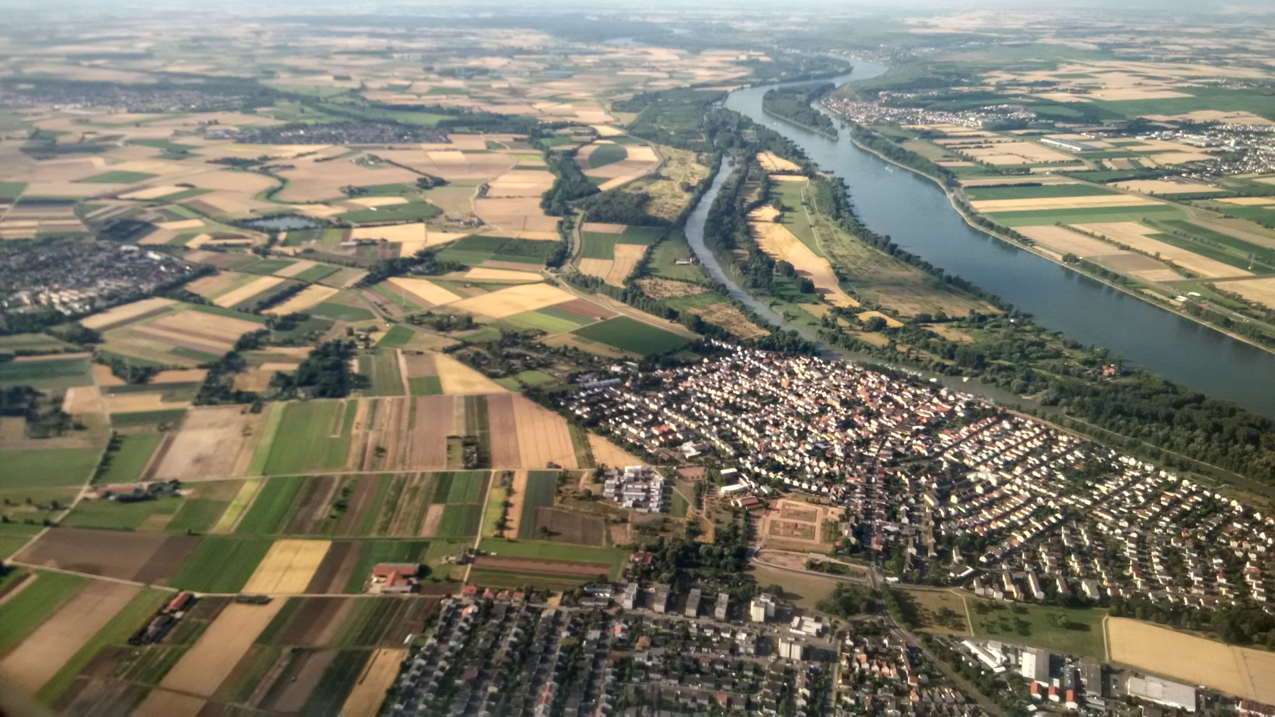 நிலப்பரப்பினை வானூர்தியிலிருந்து எடுக்கப்பட்ட ஒளிப்படங்கள். இவ்வகைப்படங்களை வான் காட்சிப்படங்கள் எனவும் அழைக்கலாம்.